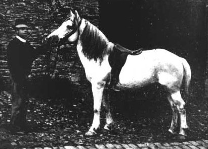 Laouée, bidet de selle, d'après une photographie publiée au début du XXe siècle